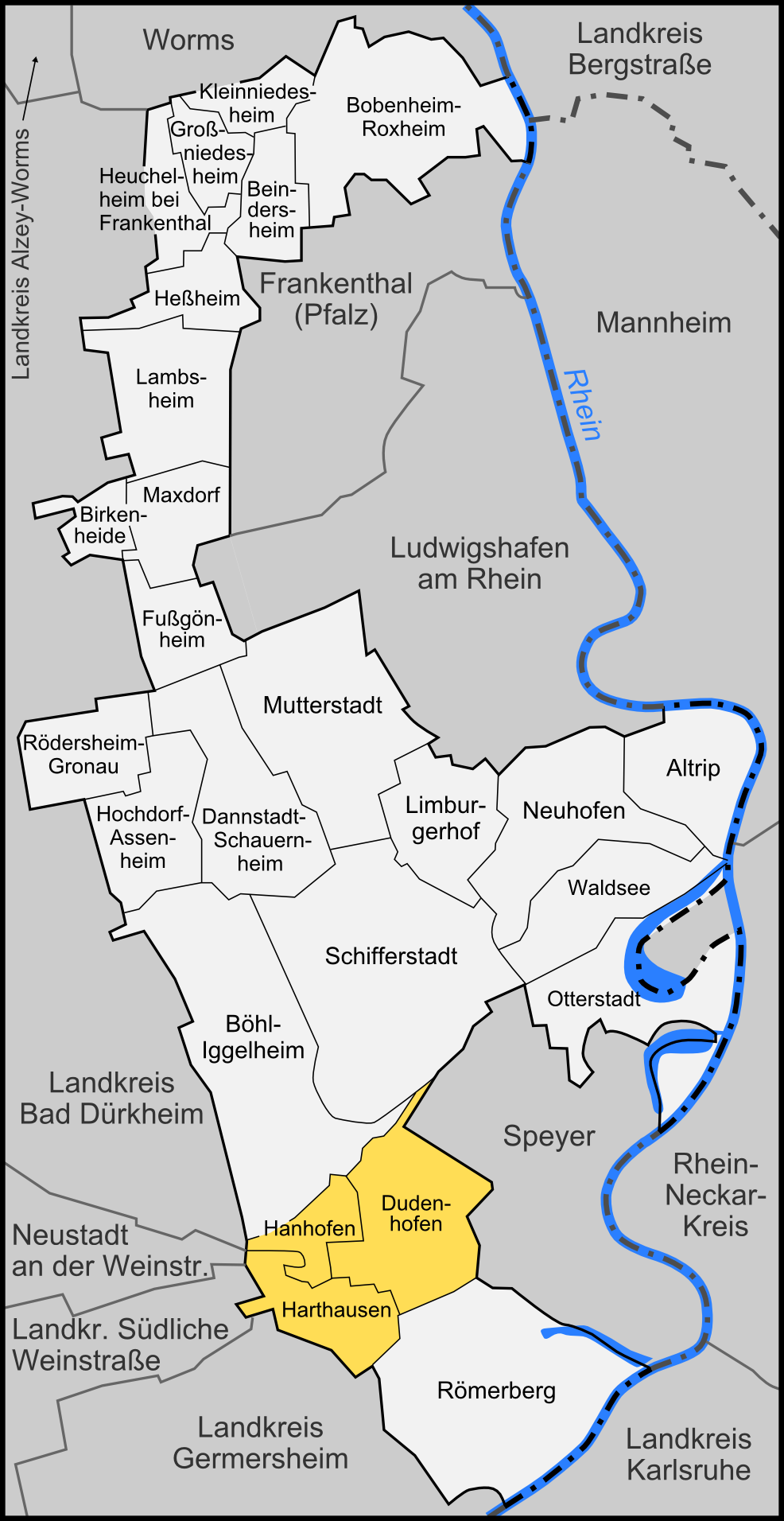 Karte der Verbandsgemeinde Dudenhofen im Rhein-Pfalz-Kreis